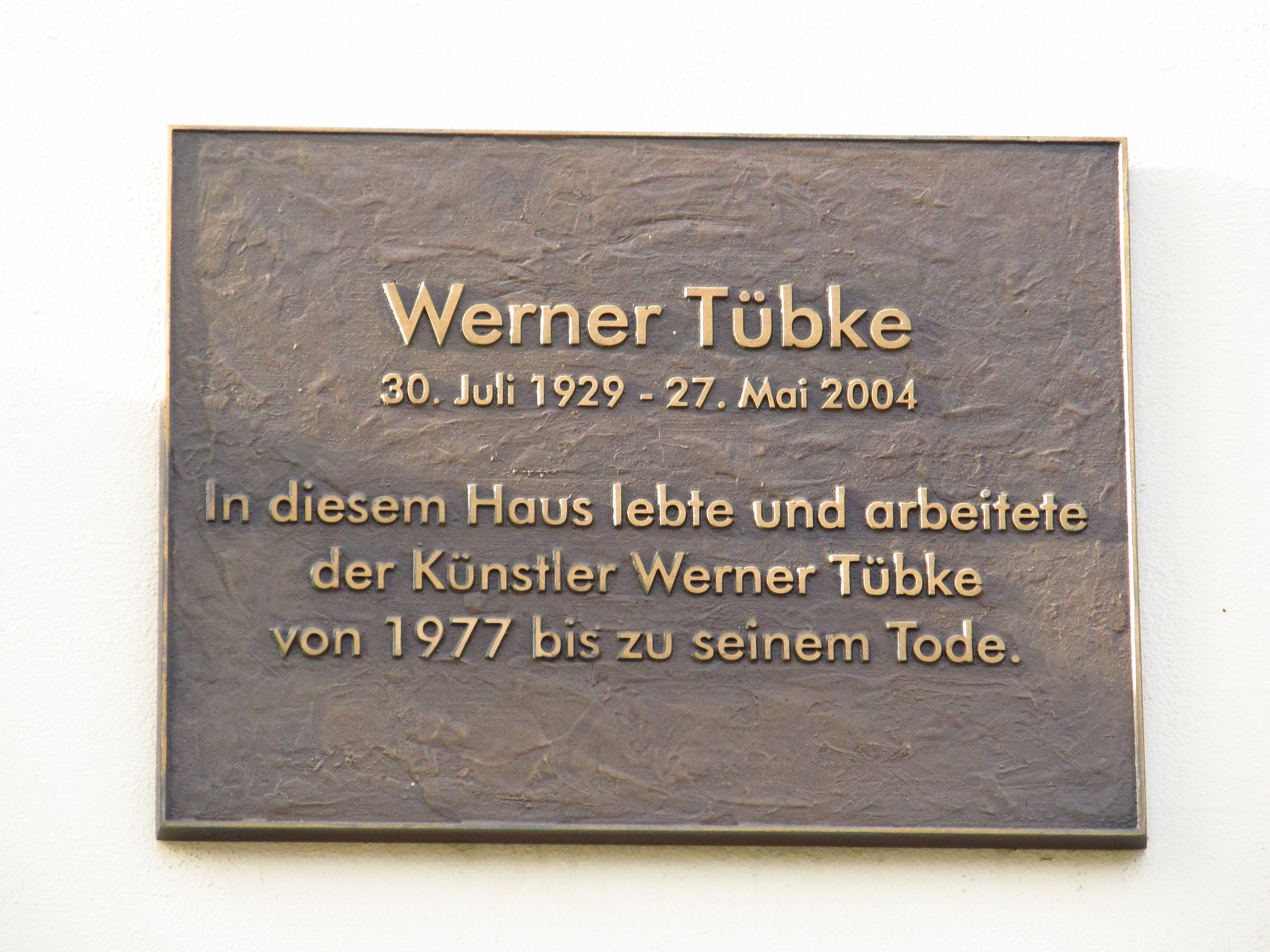 Foto der Gedenktafel an der Villa Tübke in Leipzig.